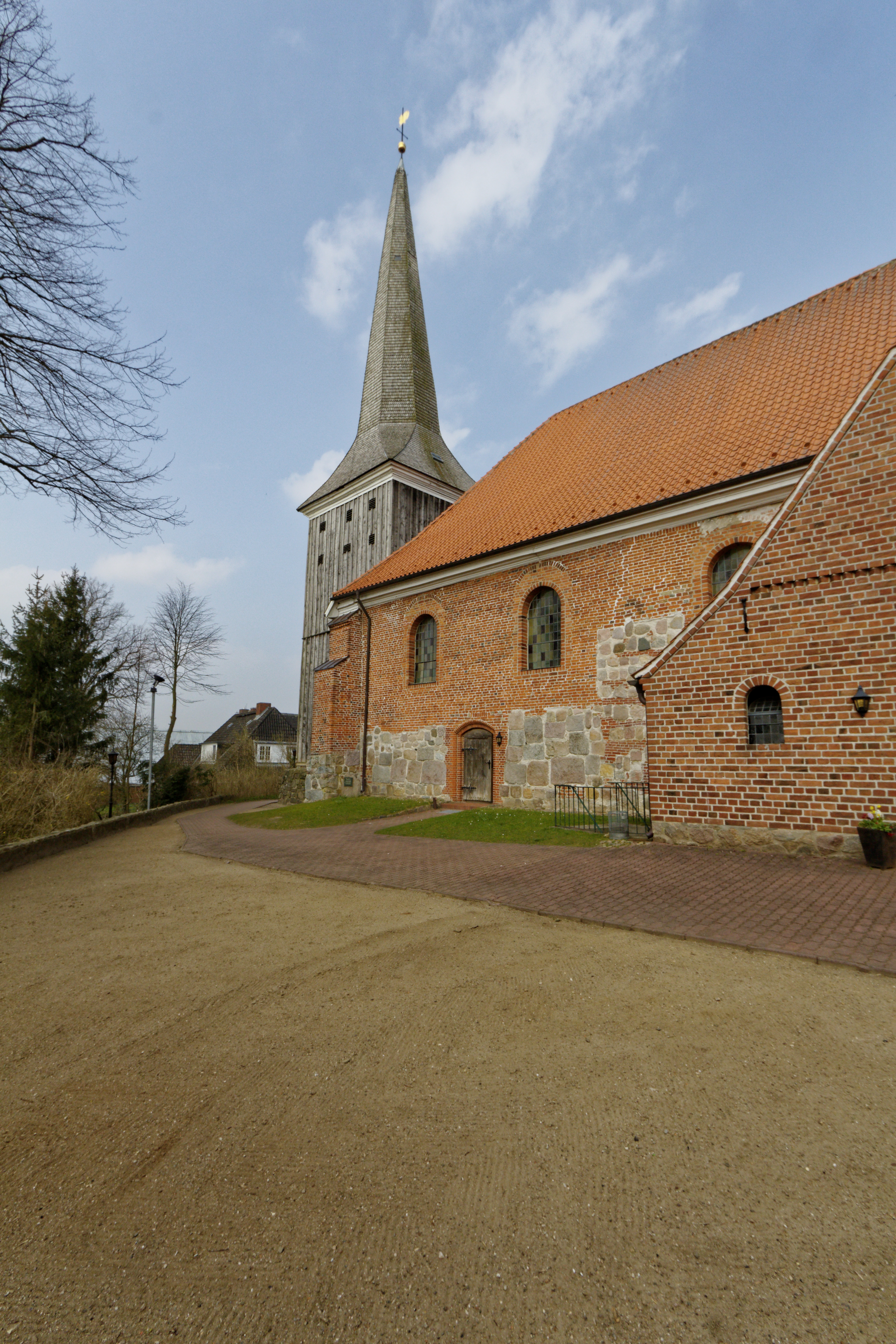 Brügge (Holstein) Kirche St.Johannis